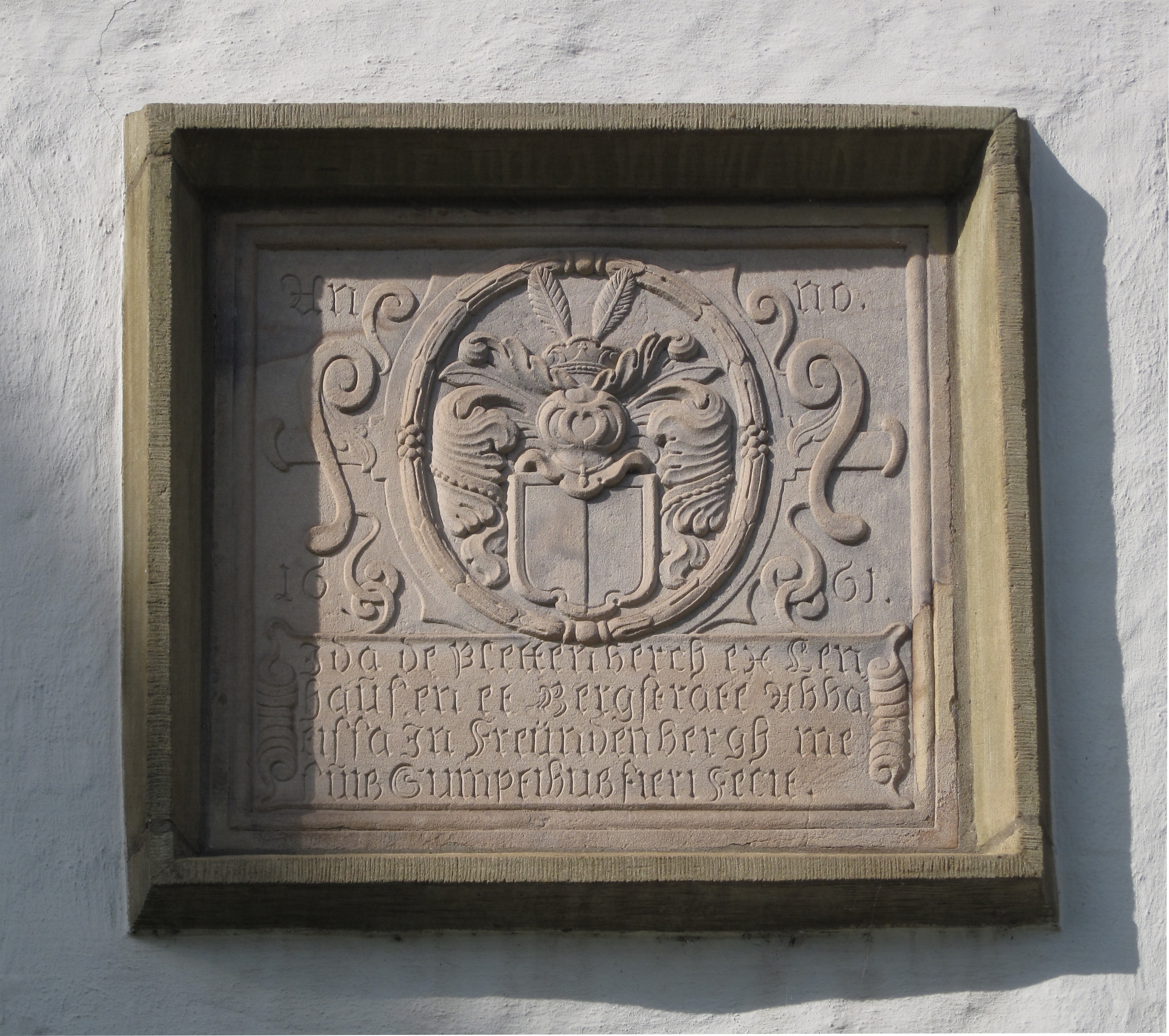 Detail am Äbtissinnengebäude, erbaut 1661 von der Äbtissin Ida von Plettenberg-Lenhausen. Kirchplatz 2 in Fröndenberg/Ruhr. This image shows a heritage building in Germany, located in the North Rhine-Westphalian city Fröndenberg/Ruhr (no. 33).